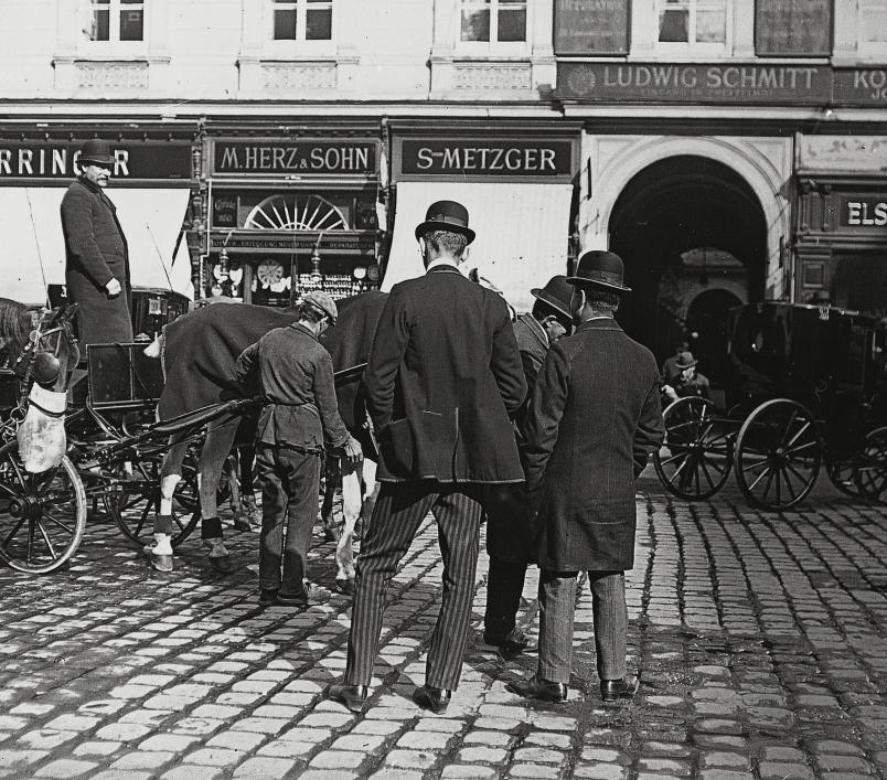 Einspännerstandplatz, Stephansplatz 6, Wien